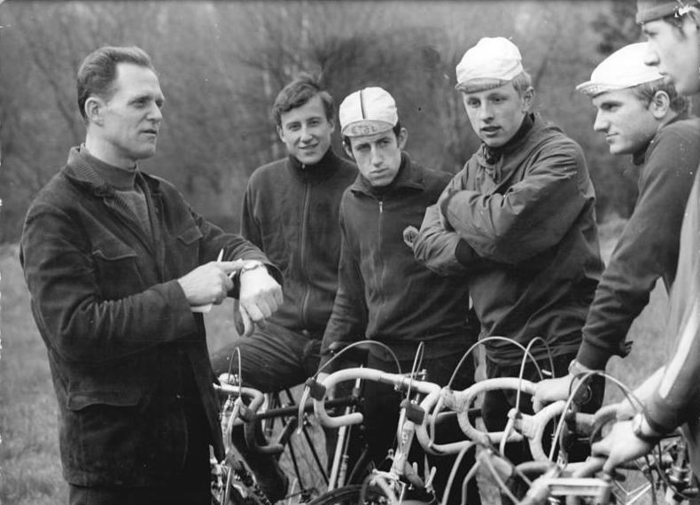 Leipzig, DHfK, Radsport Zentralbild DDR 10.6.1970-DDR: Deutsche Hochschule für Körperkultur und Sport in Leipzig eine Lehrstätte von Weltruf. Die Deutsche Hochschule für Körperkultur und Sport in Leipzig hat sich seit dem 22.10.1950 in harter und zielstrebiger Arbeit des Lehrkörpers und der Studenten zu einer der grössten und modernsten Lehr- und Forschungsstätte auf den Gebiet des Sports entwickelt. Sie unterhält enge Beziehungen zu zahlreichen wissenschaftlichen Einrichtungen gleicher Art im Ausland. In solidarischer Hilfe wurden bisher Studenten aus mehr als 20 jungen Staaten Afrikas und Asiens ausgebildet. UBz: Gustav Adolf Schur (links), zweifacher Radweltmeister der DDR, zählt zu jenen Sportlern der DHfK, die den Ruf und den sportlichen Erfolg dieser Lehr- und Forschungsstätte mitbegründeten. Beim Sportklub der DHfK arbeitet Gustav Adolf Schur als Jugendtrainer.